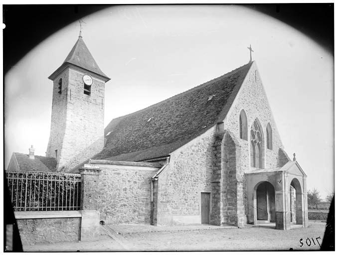 Prise de vue ensemble nord-ouest et clocher de l'église Saint-Jacques et Saint-Philippe de Ballainvilliers (Seine-et-Oise (actuelle Essonne), France).